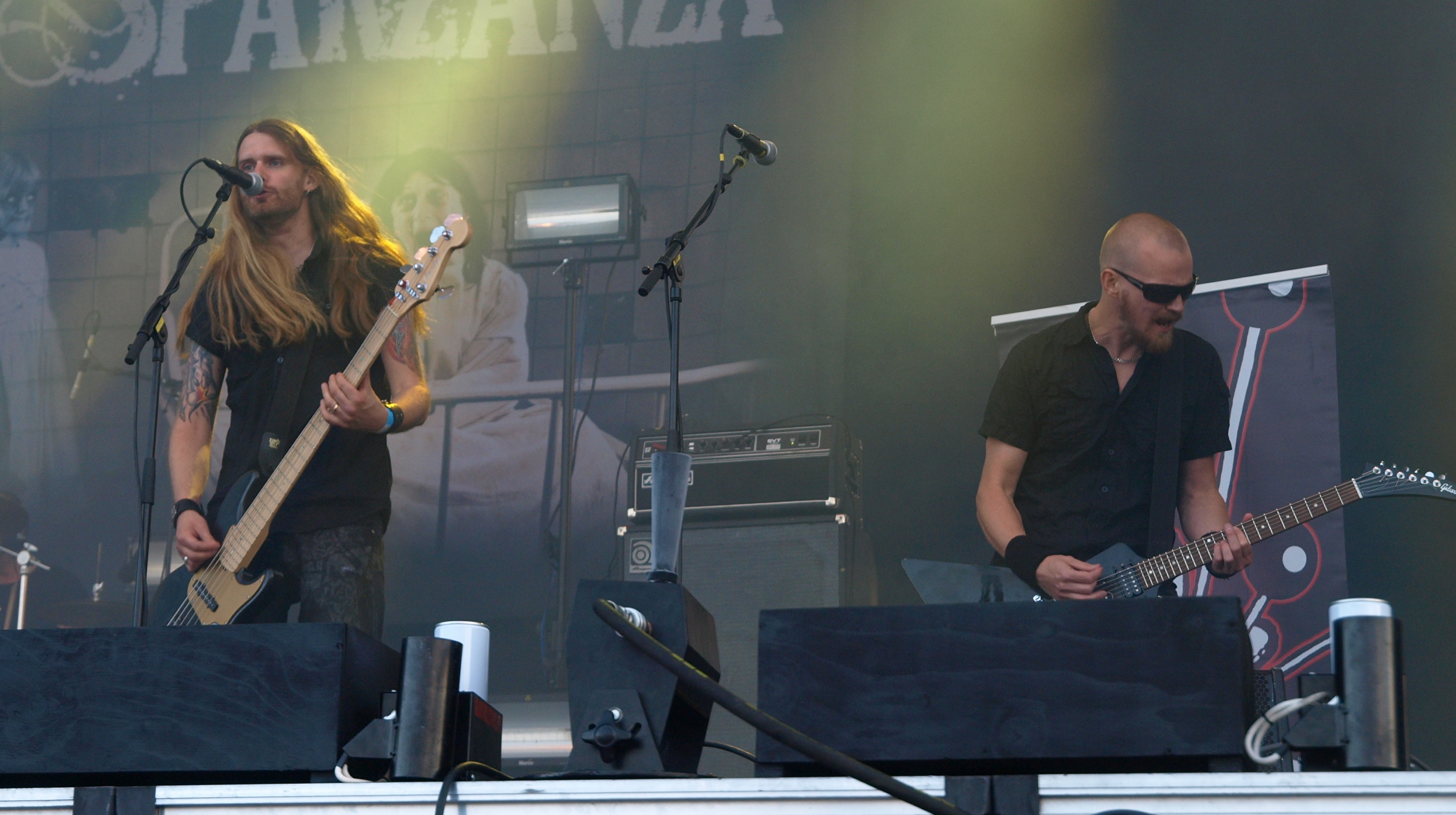 Sparzanza live am Myötätuulirock 2011